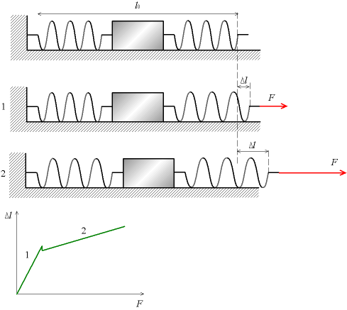 Modèle empirique de comportement mécanique lors de la déformation plastique. Auteur : Christophe Dang Ngoc Chan, réalisé avec un programme de dessin vectoriel. Licence GFDL Christophe Dang Ngoc Chan